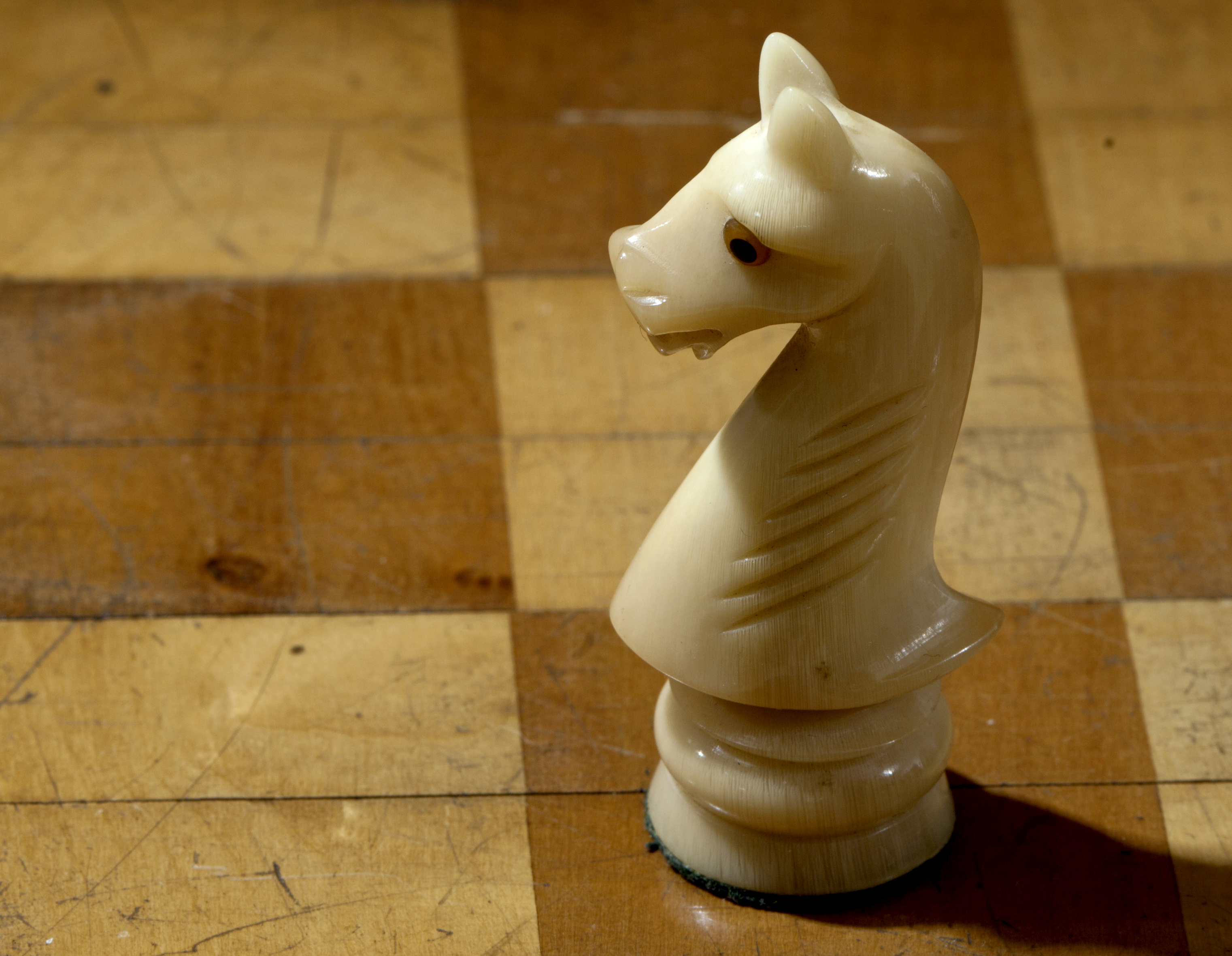 Sehr alter Satz Schachfiguren, handgeschnitzt aus Horn, Reiseschach, "Brett" aus Stäben konnte man einrollen. Springer.